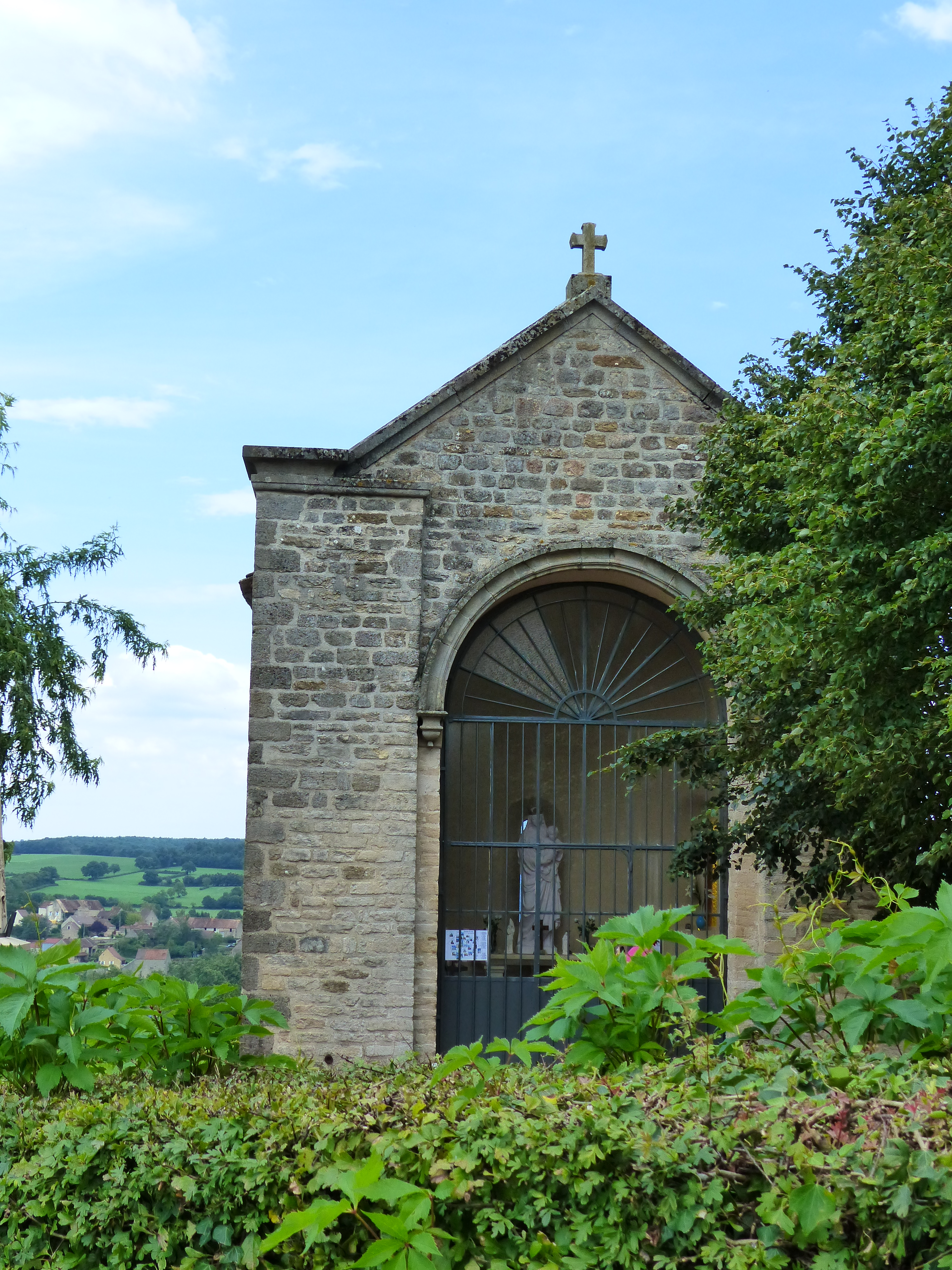 Chapelle Saint-Martin de Saint-Martin-La-Patrouille